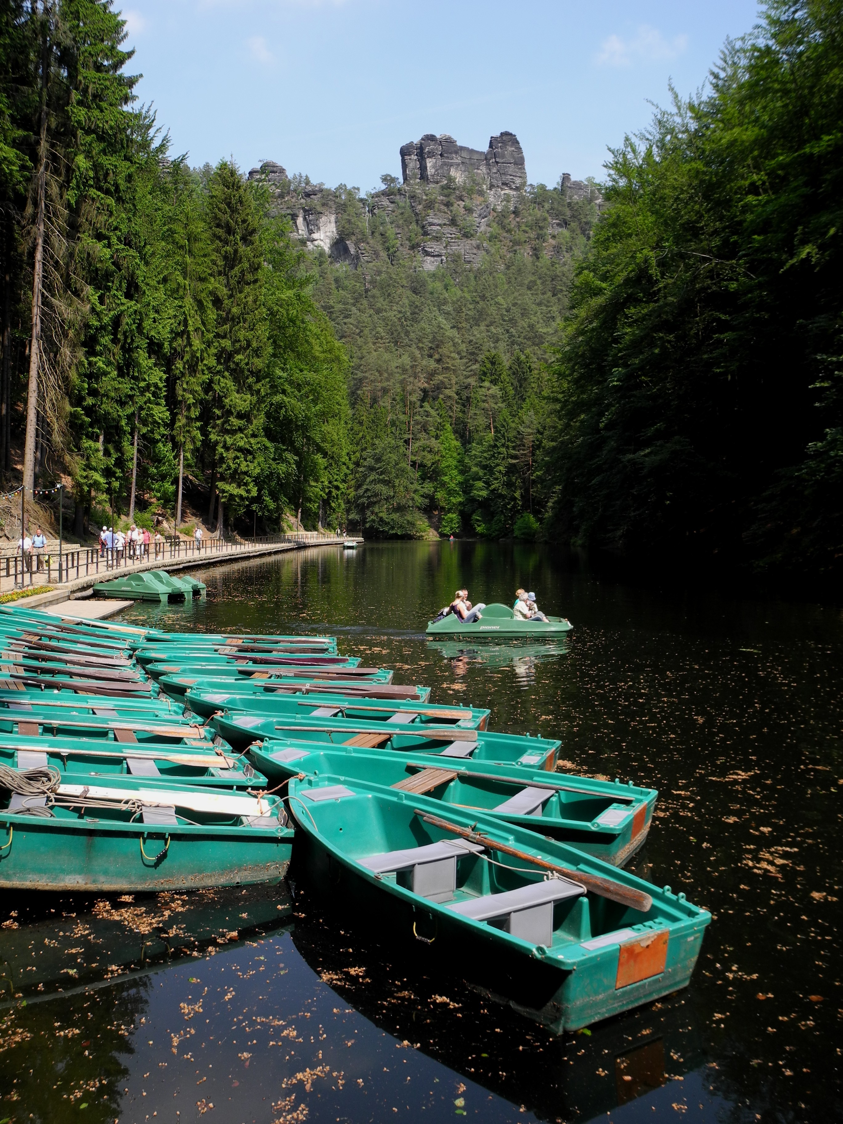 Kurort Rathen - Amselsee mit Fels Lokomotive